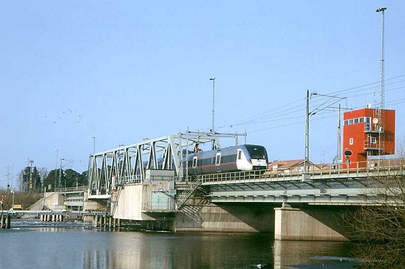 Ett tåg av typen X50 från SJ passerar Kvicksundsbron i Kvicksund invid Mälaren mellan Västerås och Eskilstuna.